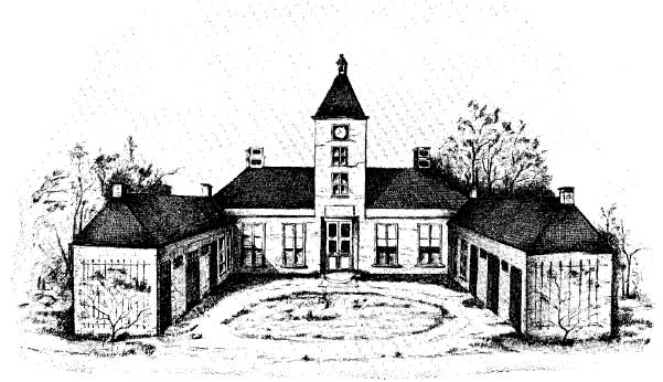 Huize Vredeveld in Assen, zoals het er omstreeks 1740 uitzag